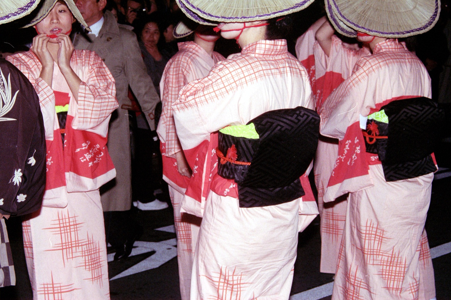 Kaze-no-bon(female dance)